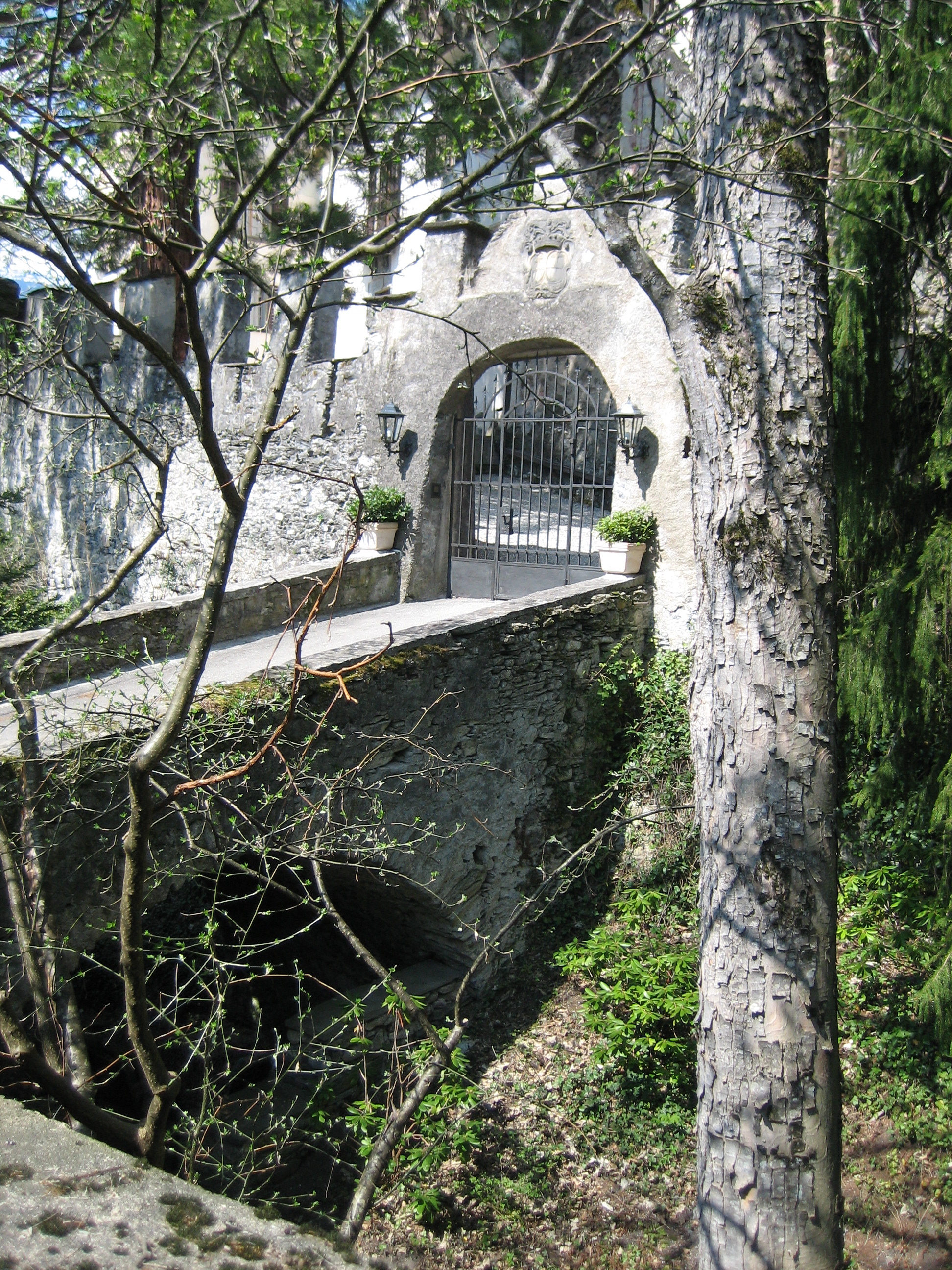 Schloss Baldenstein, Brücke zum Tor